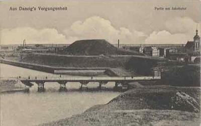 Niesistniejąca Brama św. Jakuba i nieistniejące fortyfikacje Gdańska.